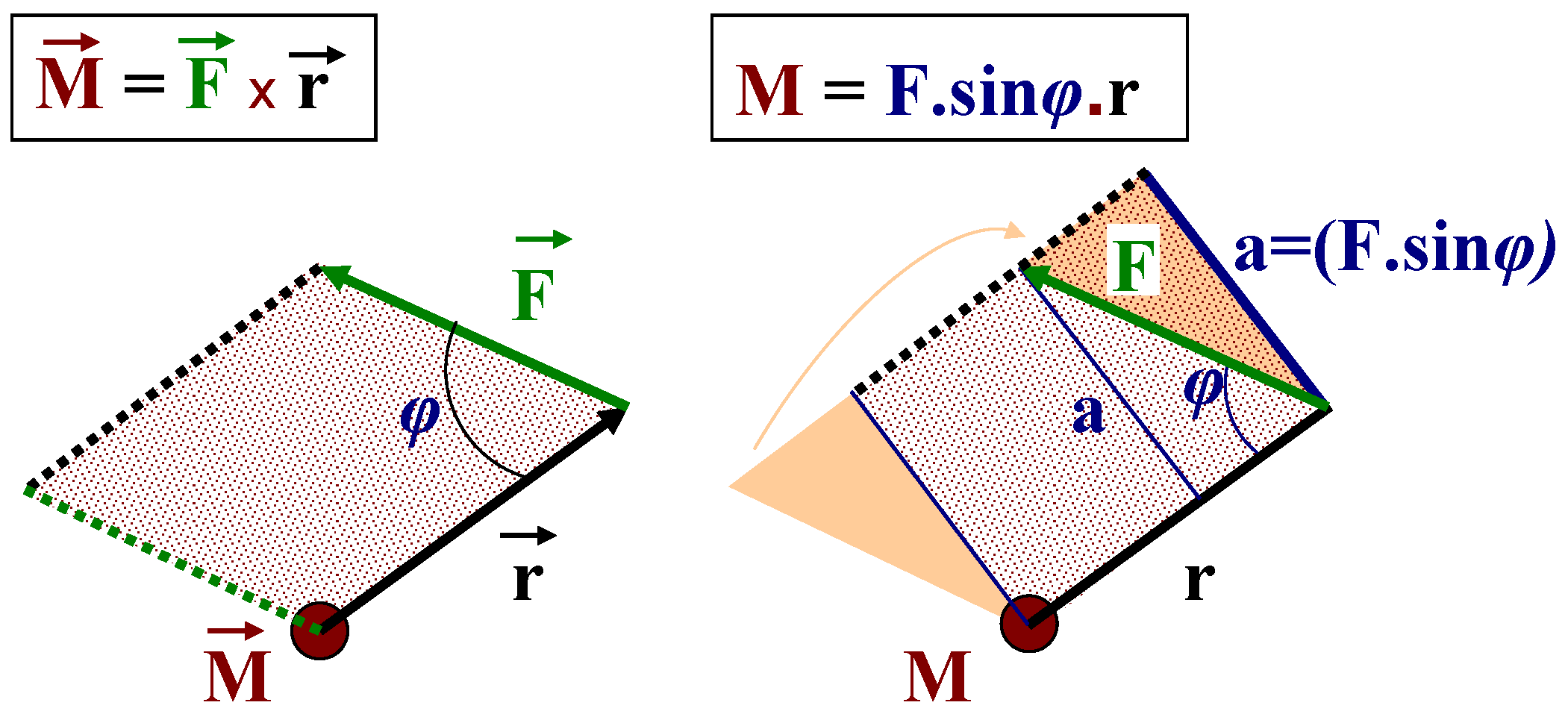 Geometricky môžme veľkosť momentu sily vyjadriť ako plochu vymedzenú vektormi F a r, čo je ekvivalentné účinku kolmej zložky sily F, teda F.sin(fi) na rameno r. viď.